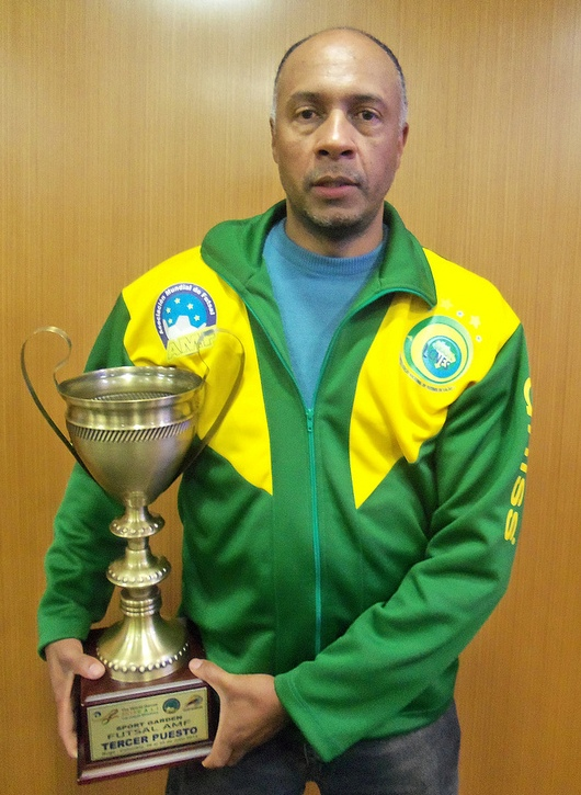 Daniel Castilho, treinador da Seleção Brasileira de Futebol de Salão (CNFS), medalha de bronze nos jogos mundiais, de posse do troféu conquistado em 2013.